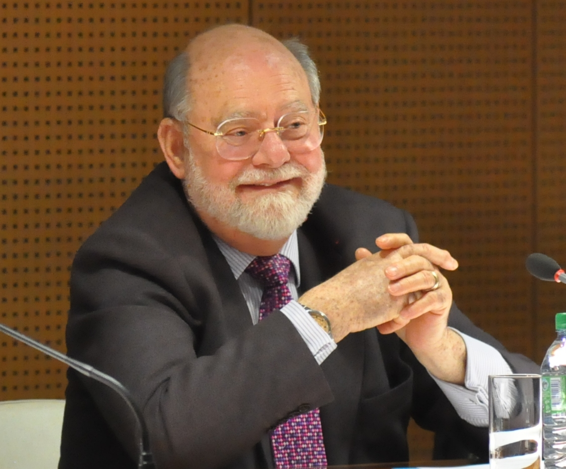 Pierre Bourguignon,Maire de Sotteville-Lès-Rouen